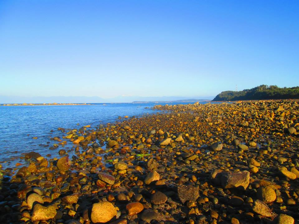 Playa en el sector Ilque, cerca de Puerto Montt.